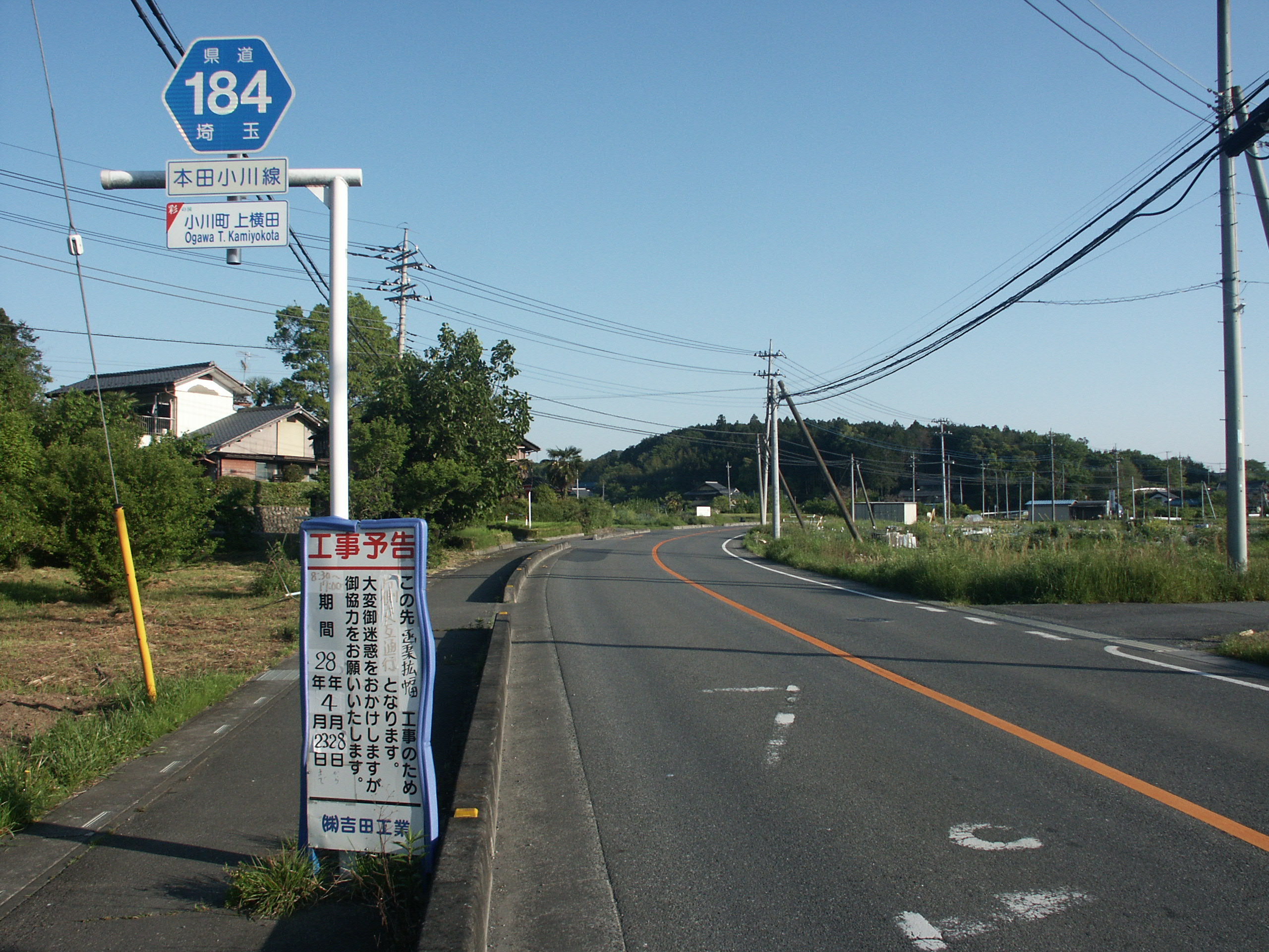 埼玉県道184号線小川町上横田付近